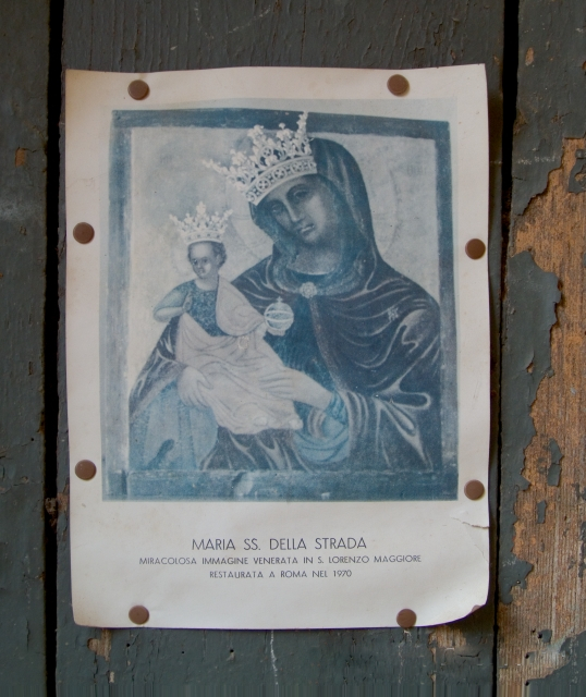 San Lorenzo Maggiore (BN): un portale con affissa una riproduzione dell'immagine della Madonna rinvenuta nel sottosuolo, nel luogo in cui fu poi costruita la chiesa di Santa Maria della Strada.